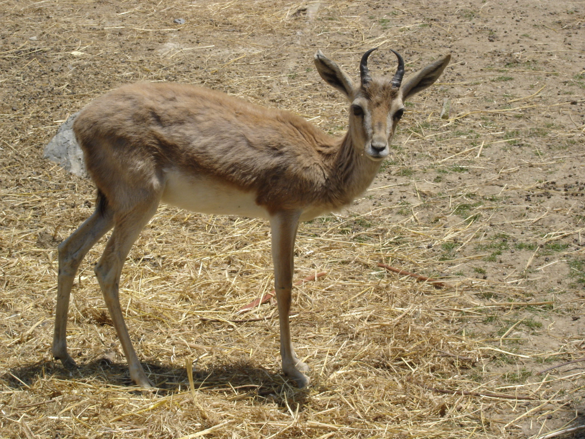 Bogazici Zoo